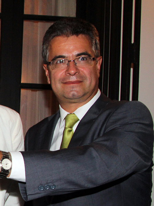 Eurocámaras Perú reúne a las cámaras de comercio de los países europeos que ya venían trabajando en el país. Presentación del gremio contó con la titular del MINCETUR, Magali Silva, así como de empresarios, diplomáticos y funcionarios públicos y privados. Ante la presencia de diplomáticos, empresarios, representantes de diversos gremios empresariales y funcionarios de diversas instituciones se presentó anoche la nueva Asociación de las Cámaras Europeas en el Perú (Eurocámaras), que congrega a las instituciones de los países de dicho continente que ya trabajaban en el Perú. Eurocámaras está conformada las 10 cámaras de comercio binacionales oficiales de los Estados europeos en Perú: las Cámaras Alemana, Francesa, Española, Italiana, Británica, Báltica, Rumana, Belga/Luxemburgo, Nórdica y Suiza. Además, la Asociación cuenta con el apoyo de la Delegación de la Unión Europea en Perú. Al cóctel del lanzamiento, que se realizó el martes 20 de enero de 2015 en la residencia del Embajada de España, asistieron la Ministra de Comercio Exterior y Turismo del Perú, Magali Silva, así como los embajadores de la Unión Europea en el Perú, Irene Horejs; España, Juan Carlos Sánchez Alonso; Alemania, Jörg Ranau; Polonia, Izabela Matusz; el encargado de negocios de Rumania, Stefan Nicolae; así como el nuevo presidente de Eurocámaras Perú, Bernd Schmidt y representantes de cada una de las cámaras europeas asociadas.